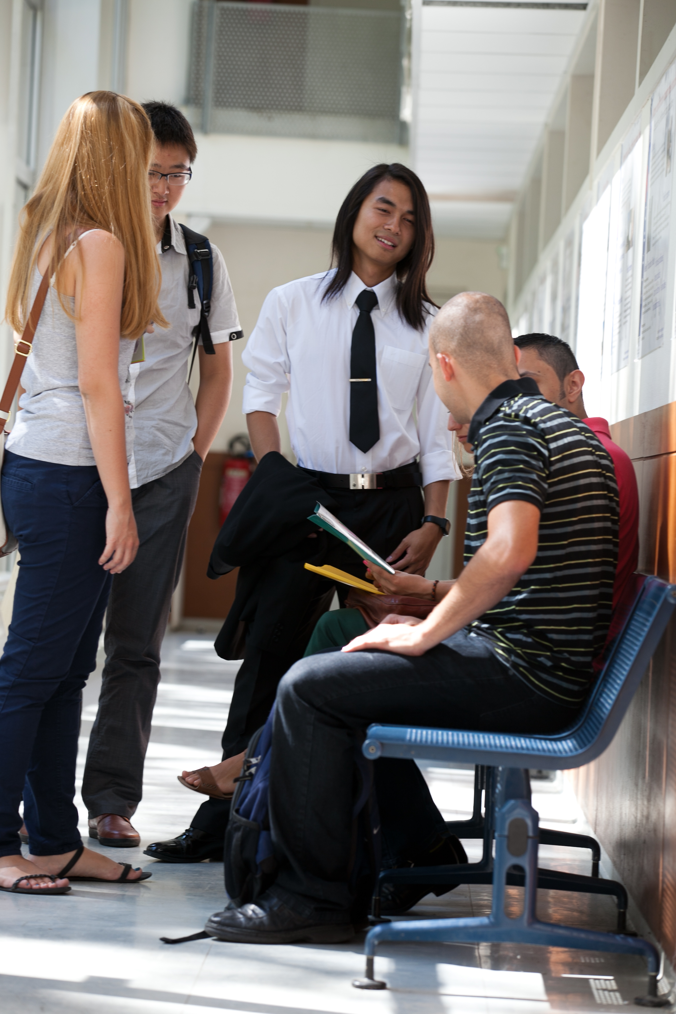 Etudiants UFC